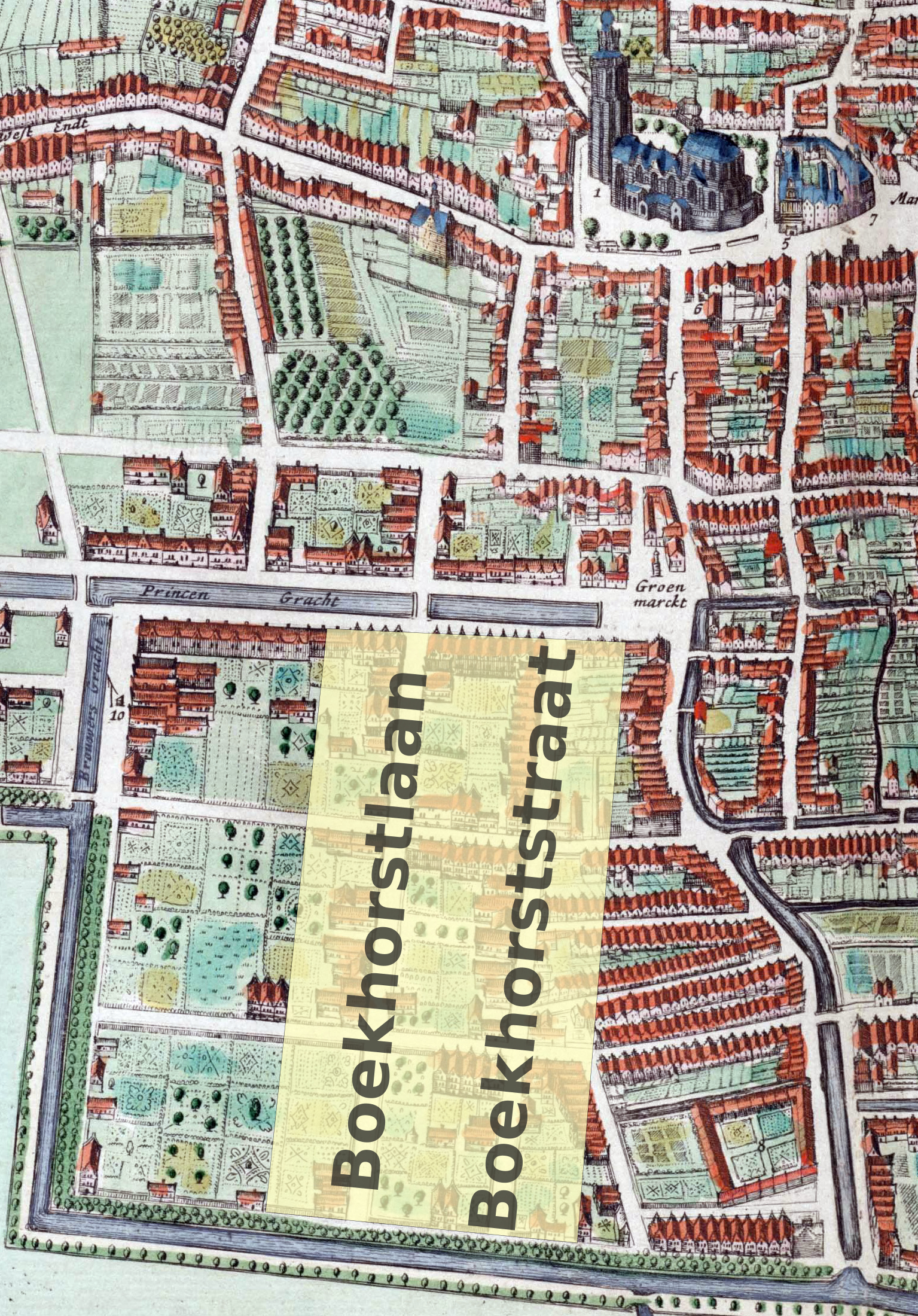 Boekhorststraat en Boekhorstlaan, Den Haag. De Boekhorstlaan heet tegenwoordig Lange Beestenmarkt. Het gemarkeerde gebied moet ongeveer het grondbezit zijn geweest van Jhr. Mr. Amelis van den Bouckhorst. Rechtsboven de Grote of Sint-Jacobskerk.